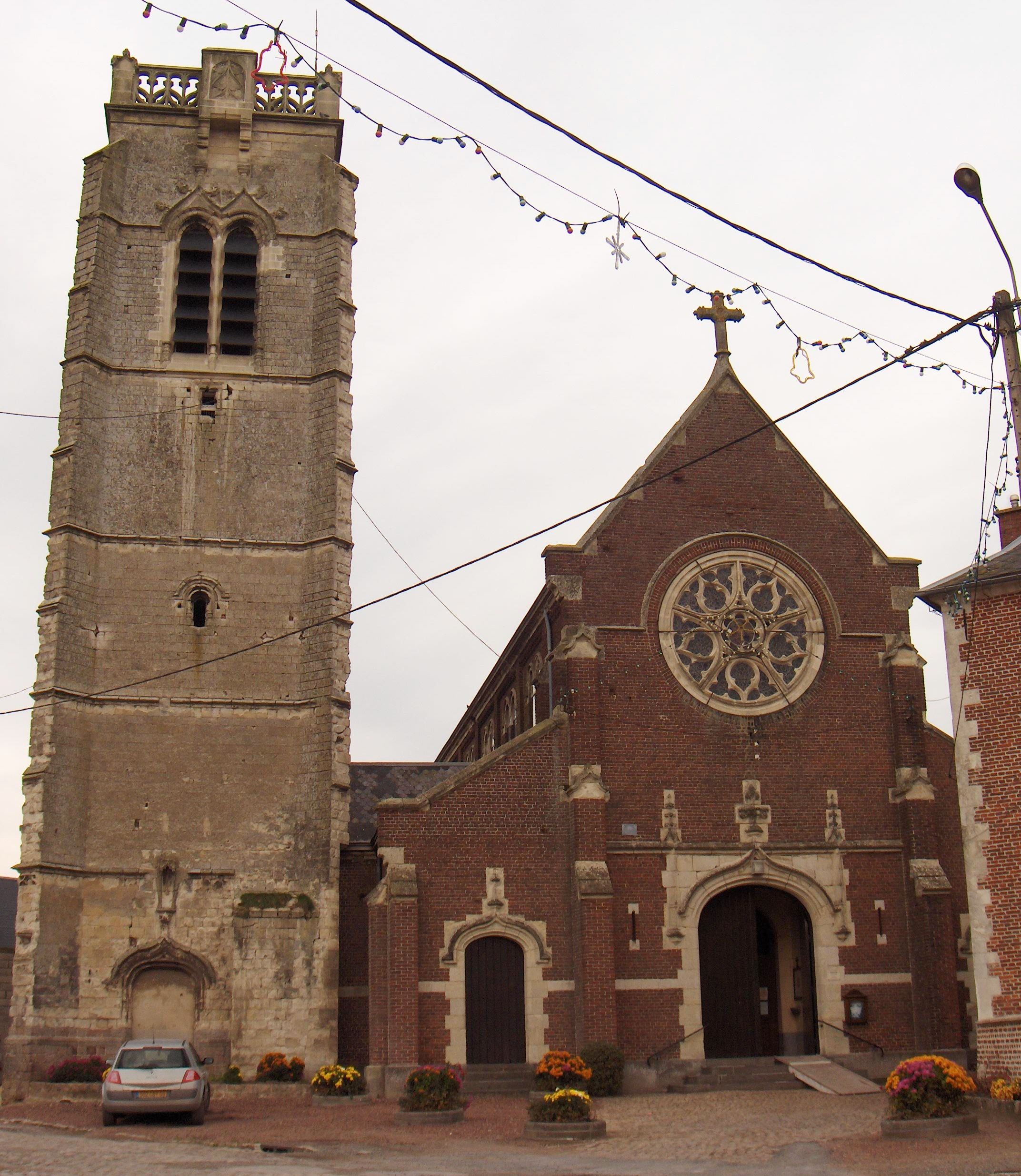 Dorfkirche (Sankt Germanus) zu Carnières (Frankreich, Dept. Nord), Turm aus dem 16. Jh., neugotische Kirche aus dem 19. Jh. (Architekt: Louis Cordonnier).